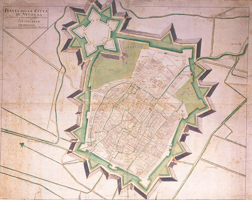 immagine tratta dal sito